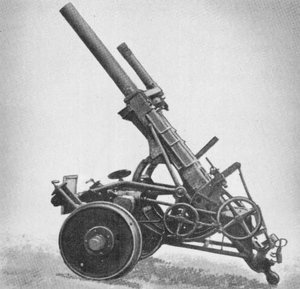 10-cm nebelwerfer 40, mortier lance fumigène